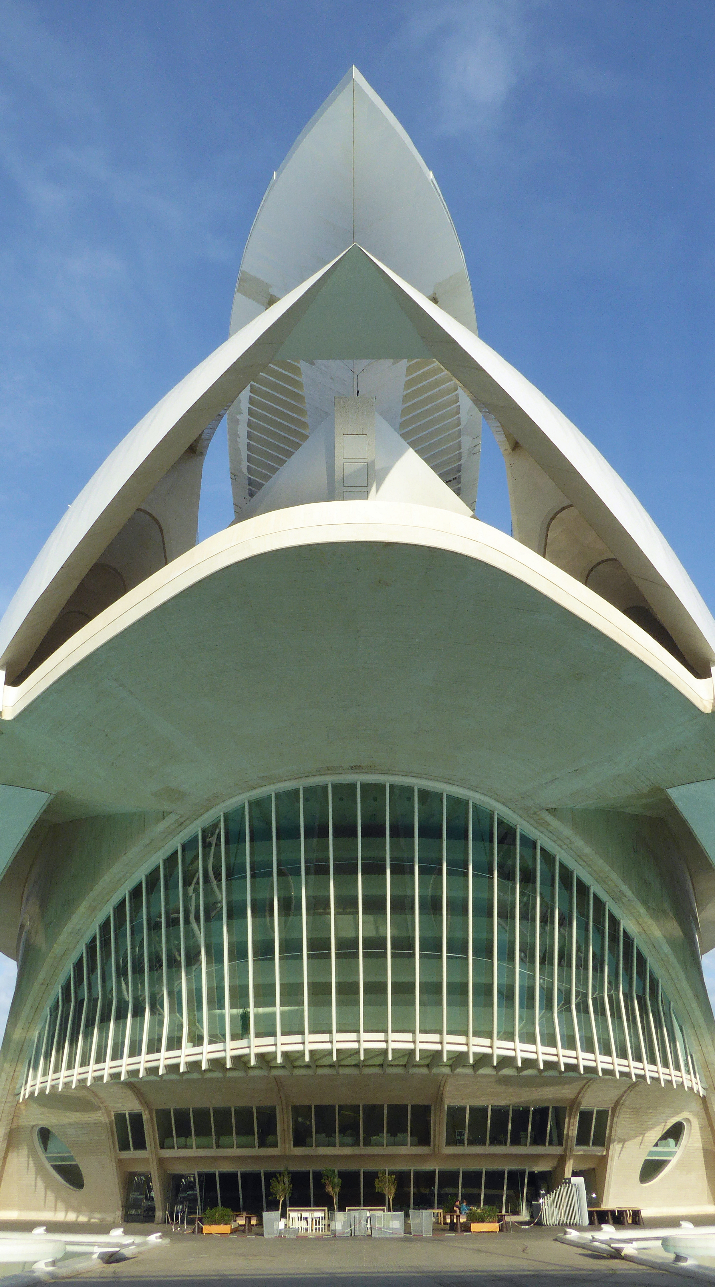 El Palau de les Arts Reina Sofía (2005). Ansicht von Südost. Die Oper in der Ciudad de las Artes y las Ciencias in Valencia, Spanien. Foto Wolfgang Pehlemann P114009